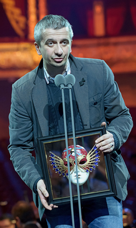 Константин Богомолов и Игорь Миркурбанов Фотограф Дмитрий Дубинский 2014